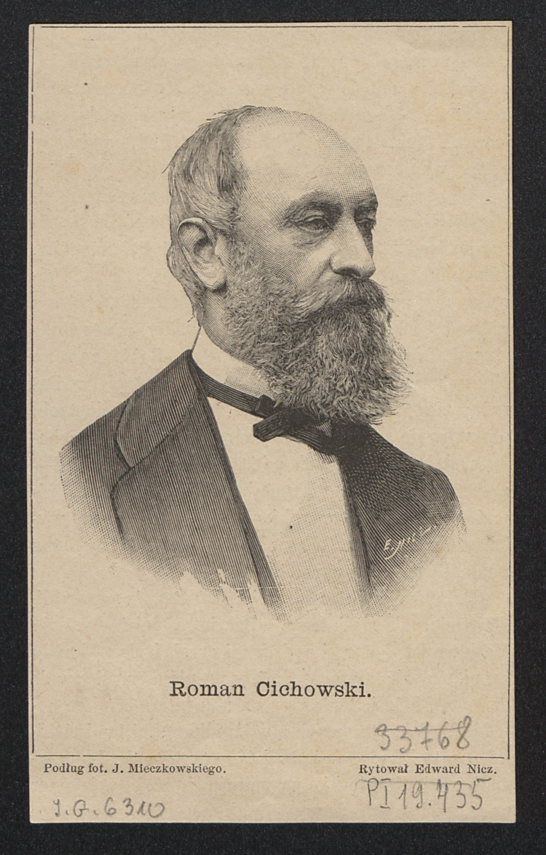 Roman Cichowski, 1889 r.